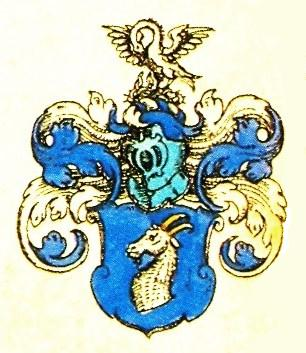 Wappen derer von Blan(c)kenburg; märkisch-pommerscher Uradel